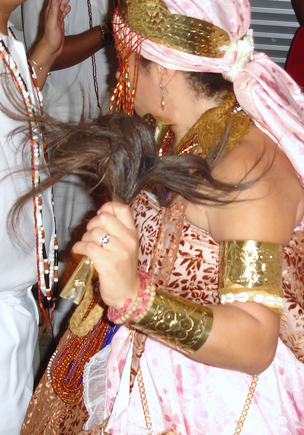 Irukerê é um apetrecho do Orixa Oya